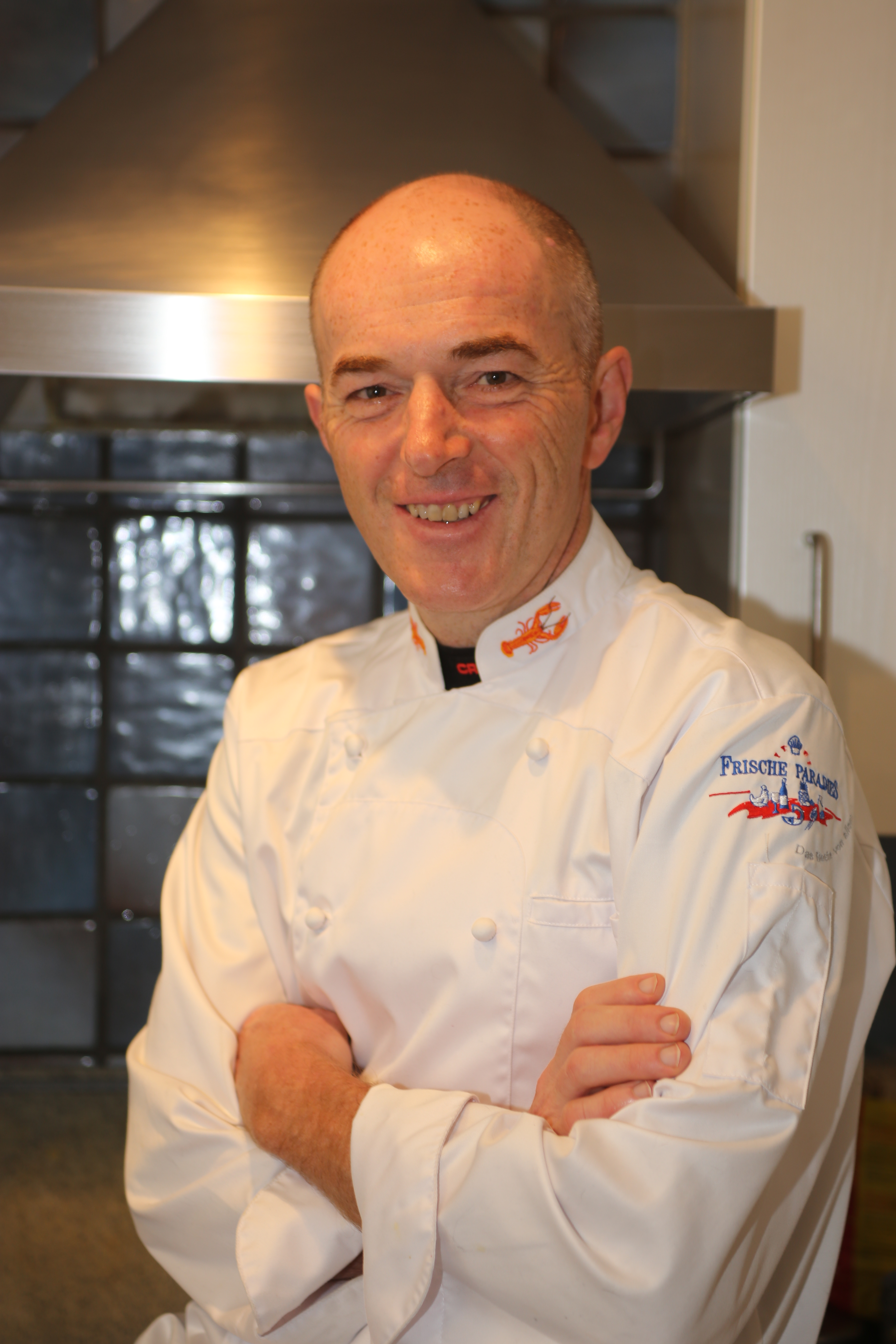 Walter Bauhofer in der Küche